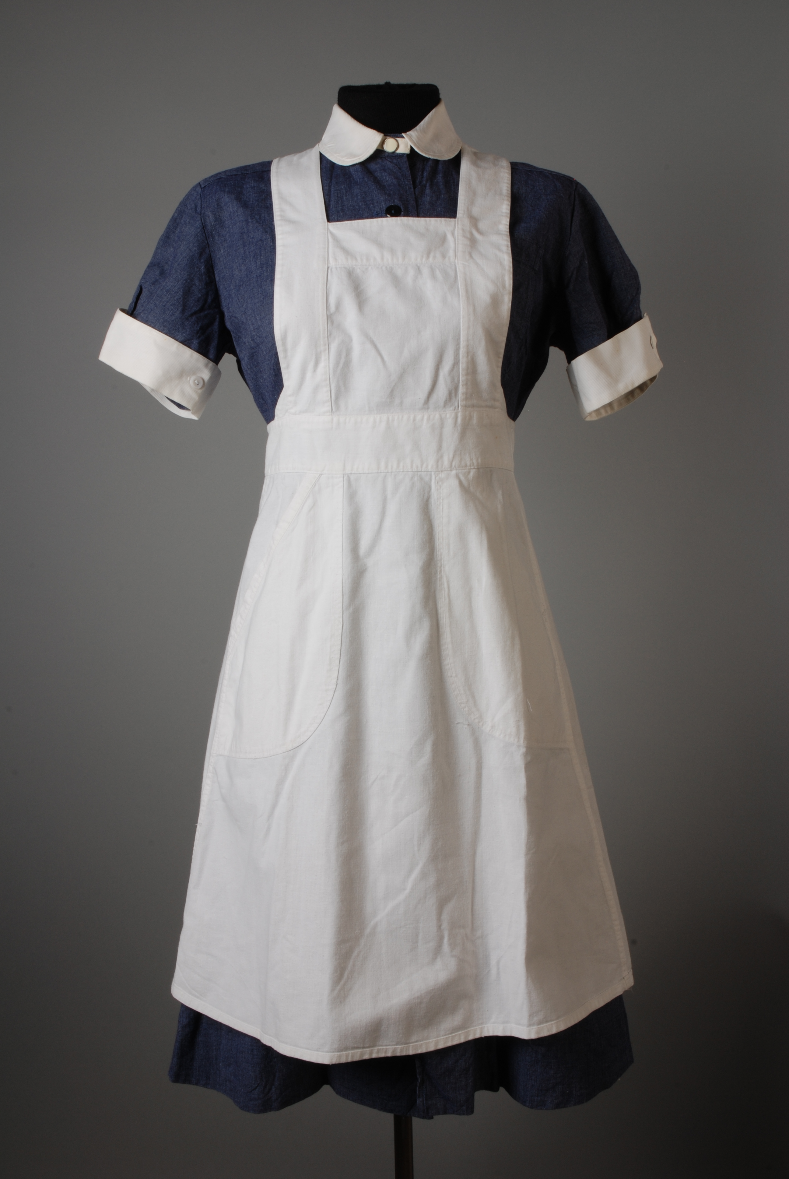 Objectgegevens Titel: Jurk van blauw-wit katoen met wit schort, witte kraag en manchetten, uniform Maasoord Beschrijving: Jurk van blauw-wit katoen (1) waarover wit schort (2), aangeknoopte witte kraag (3) en manchetten (4-5). Herkomst: Ziekenhuis Maasoord, Poortugaal Trefwoorden: japon, schort, bovenkleding, werkkleding, vrouwenkleding, kleding, kostuum, verpleegstersuniform, uniform Opschrift / merk: Wasmerkje in het schort: "420". In de hals van de jurk: "40". Datering: 1945 - 1955 Technieken: textiel Materiaal: katoen Afmetingen: (cm) nr.1: lg 103,0 / br 66,0 / dp 3,0 / nr.2: lg 90,0 / br 59,0 / dp 3,0 Associatie: kleden, Rotterdam, psychiatrie, verpleging, Maasoord, Delta Ziekenhuis, ziekenhuis, Poortugaal, Albrandswaard, vrouw Vorm & decoratie: jurk Inventarisnr: Museum Rotterdam 76539-1-5